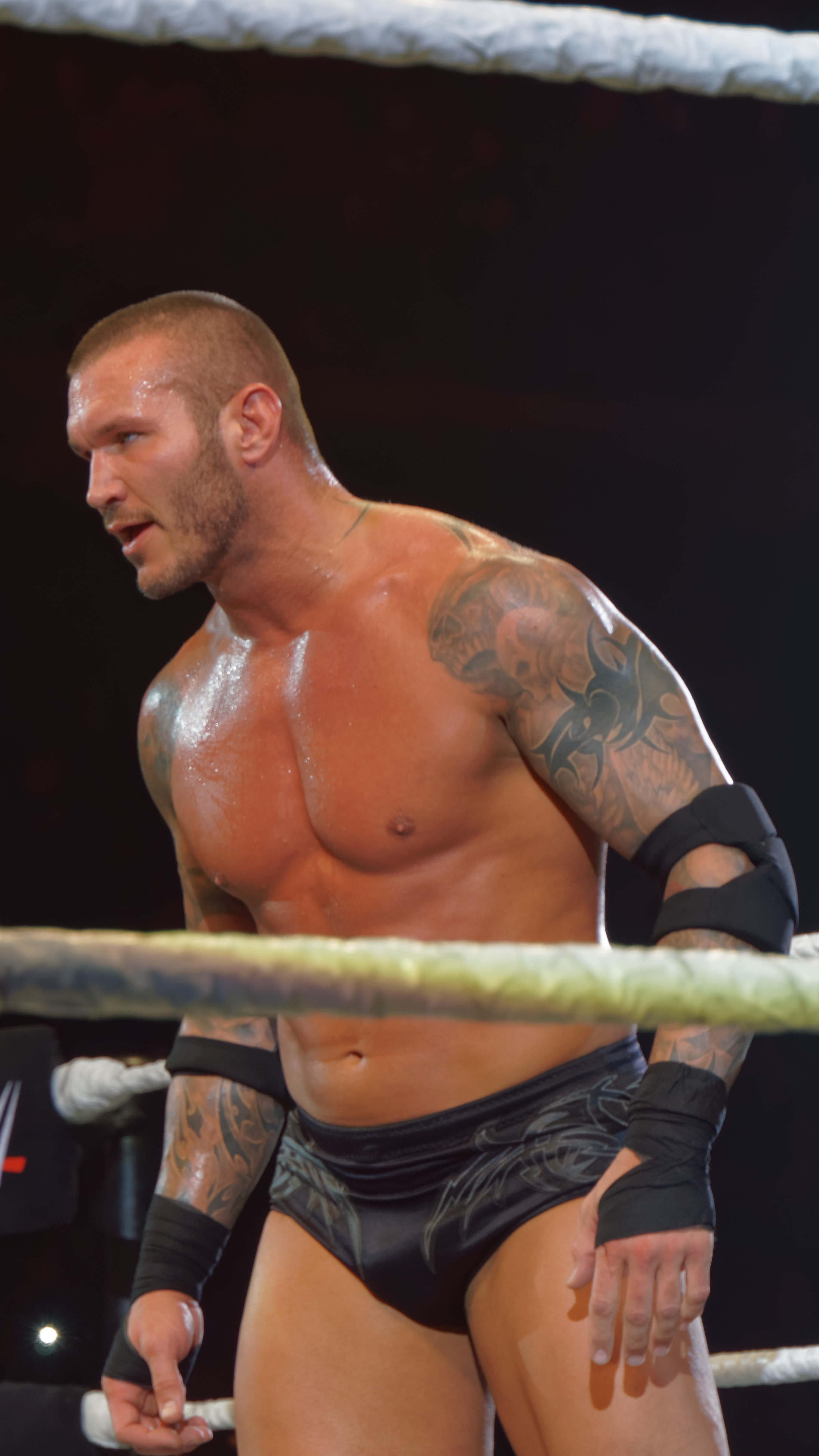 WWE Live@Lotto Arena - Antwerpen